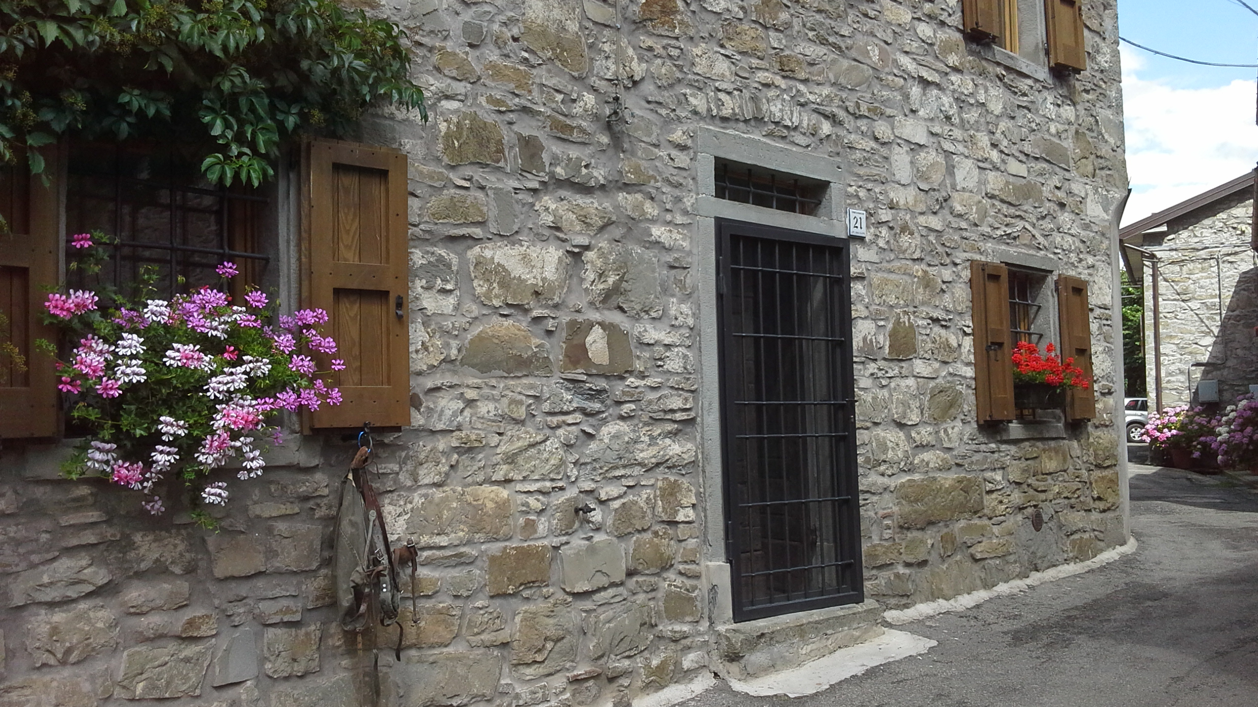 Casa Calistri - Abitazioni caratteristiche II